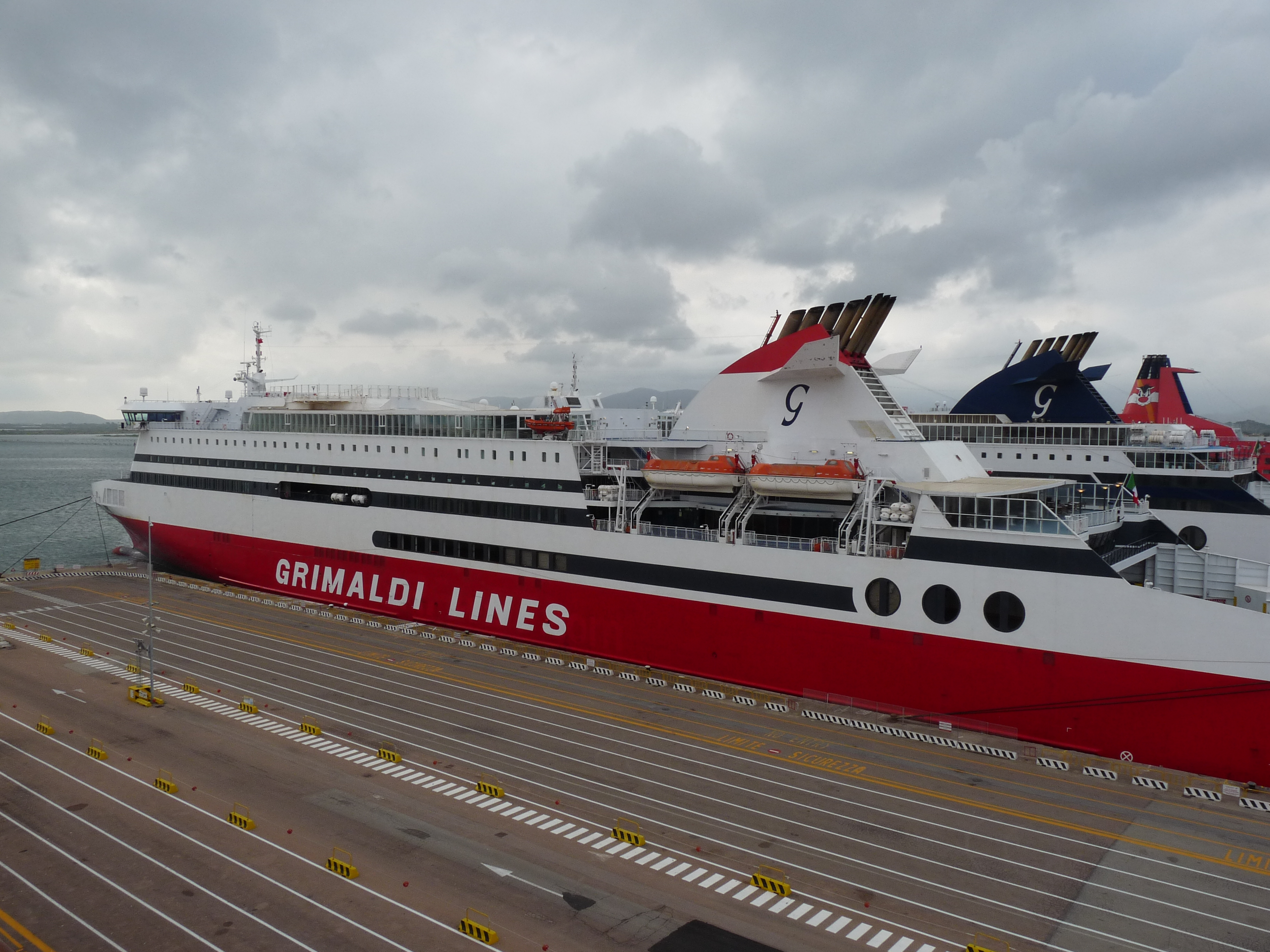 De veerhaven van Olbia